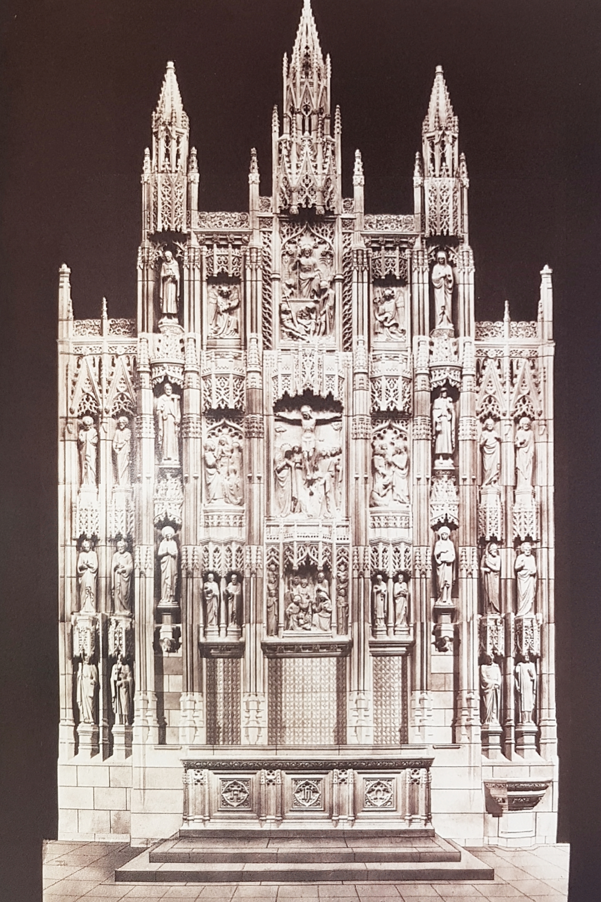 Altar maggiore nella cattedrale di All Saints Church a Worecester, creato da Angelo Lualdi